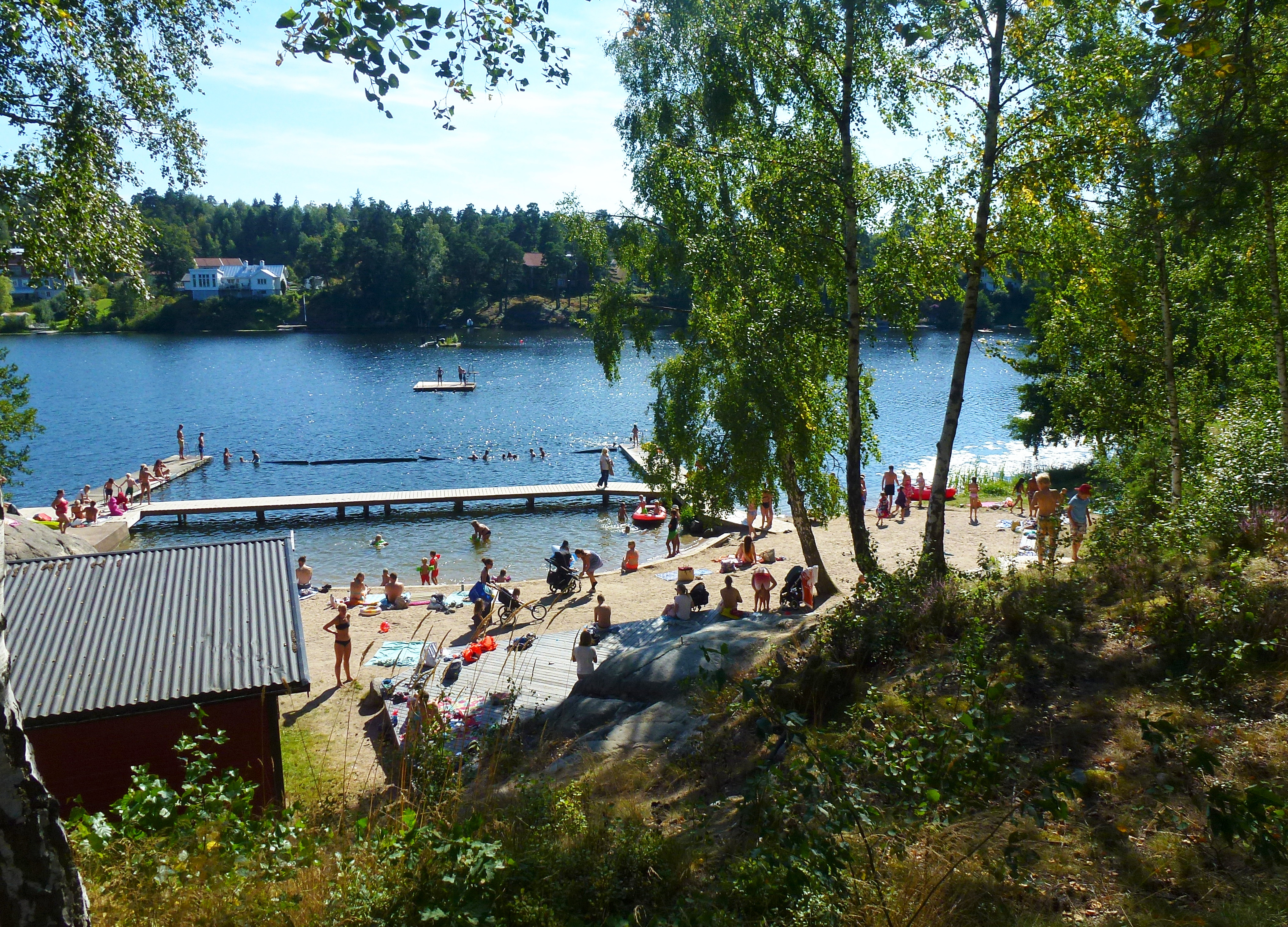 Bagarsjön i Lännersta, badplatsen